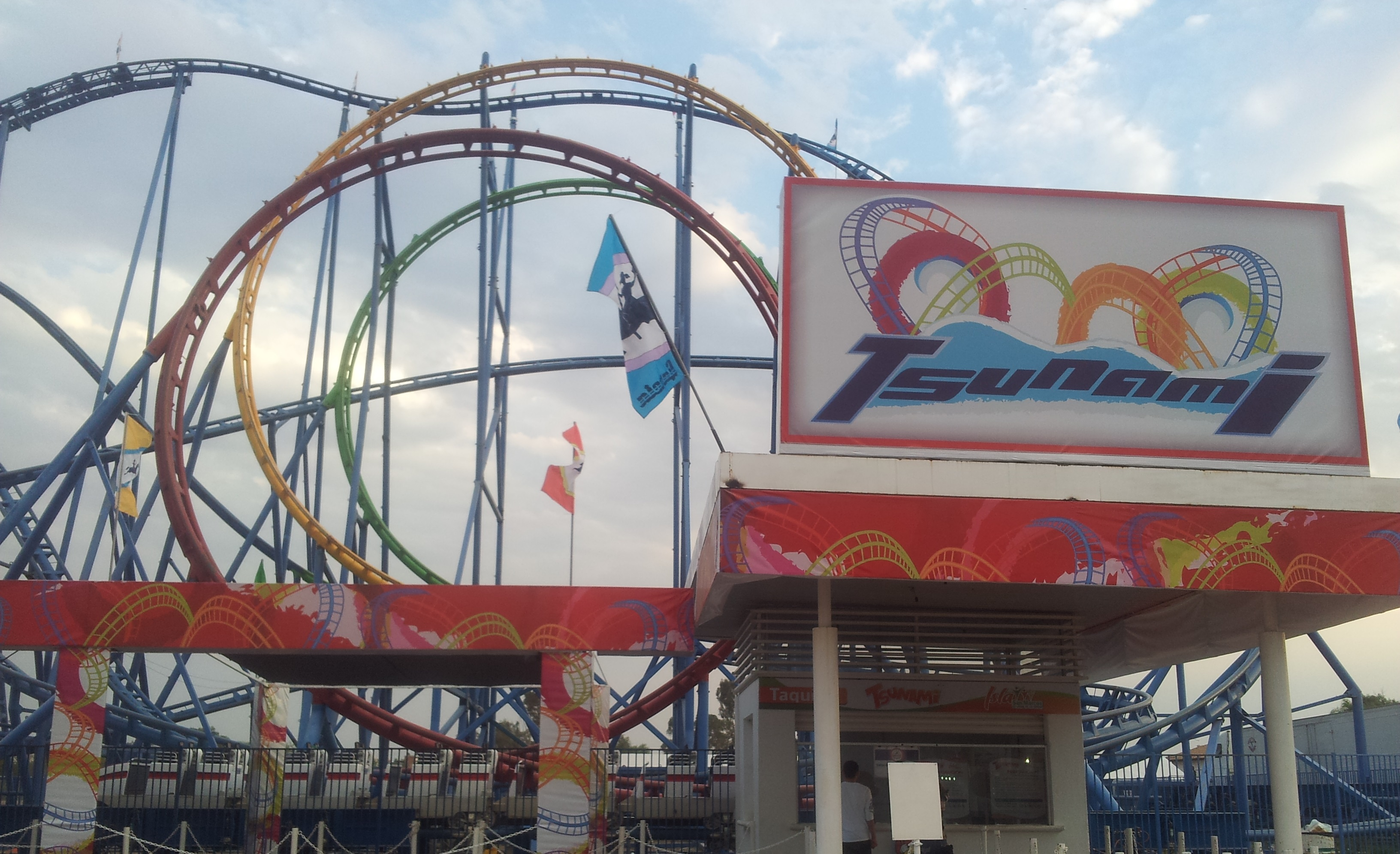 Tsunami, Tren, Taquilla y Línea de espera